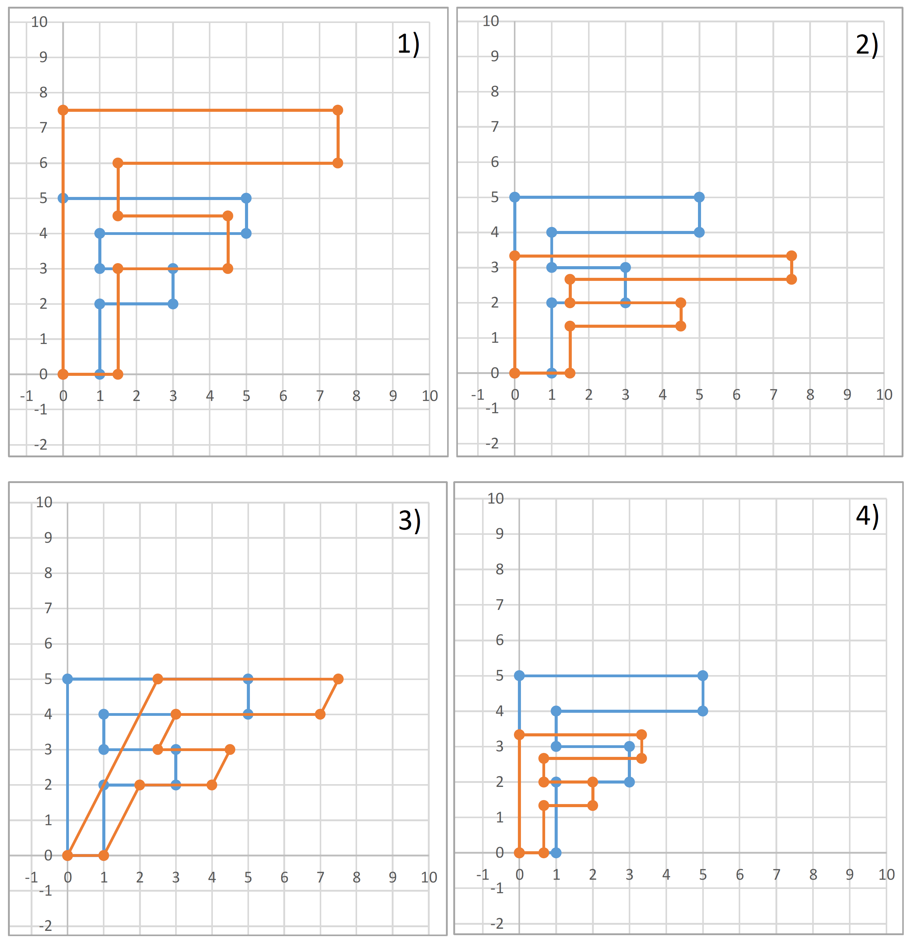 Distintos tipos de escalado: 1) Aumento 2) Aplanado 3) Cizallado 4) Reducción